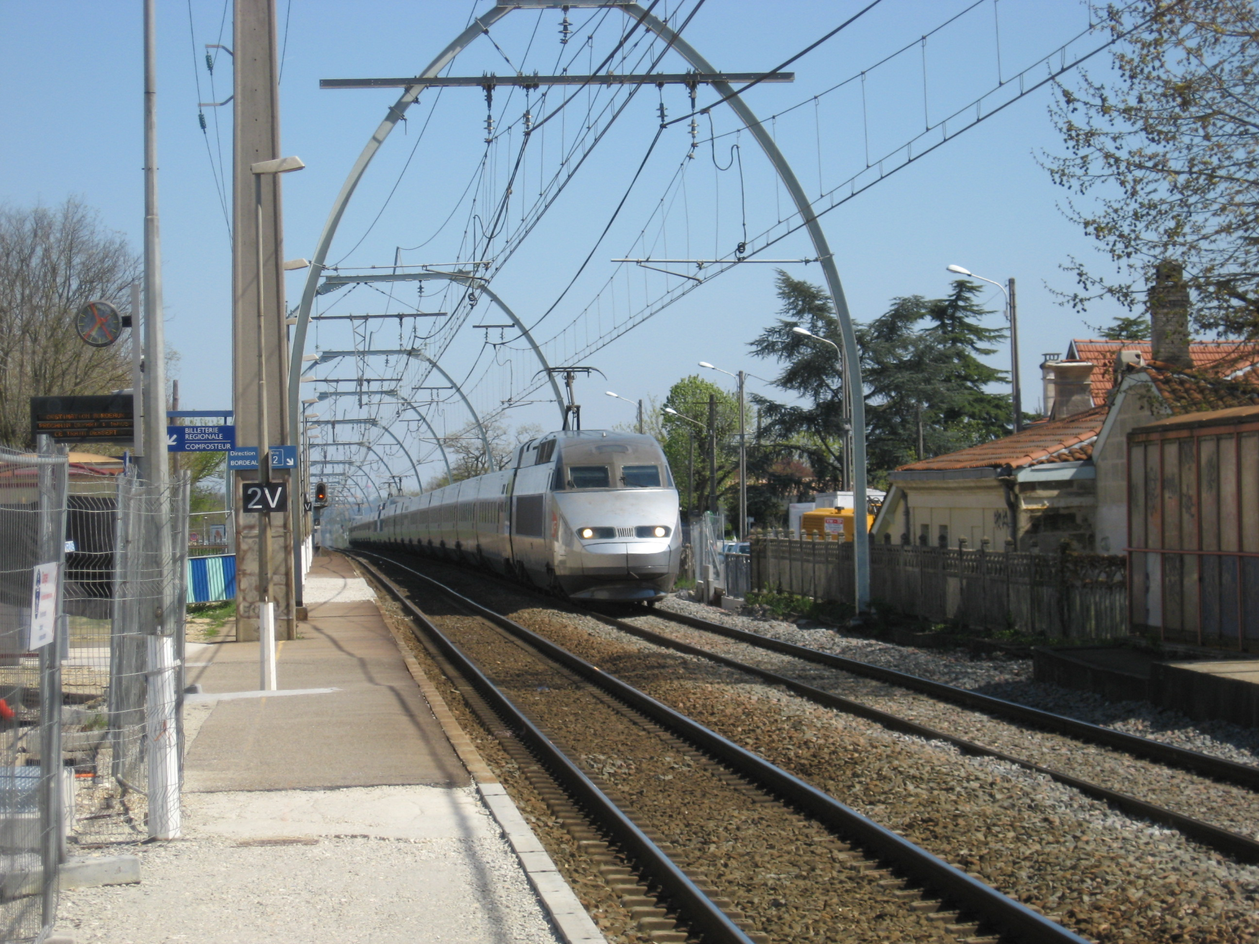 2 Atlantique TGV sets on the Bordeaux Dax line. By suburban station Pessac. Typical "midi" overhead